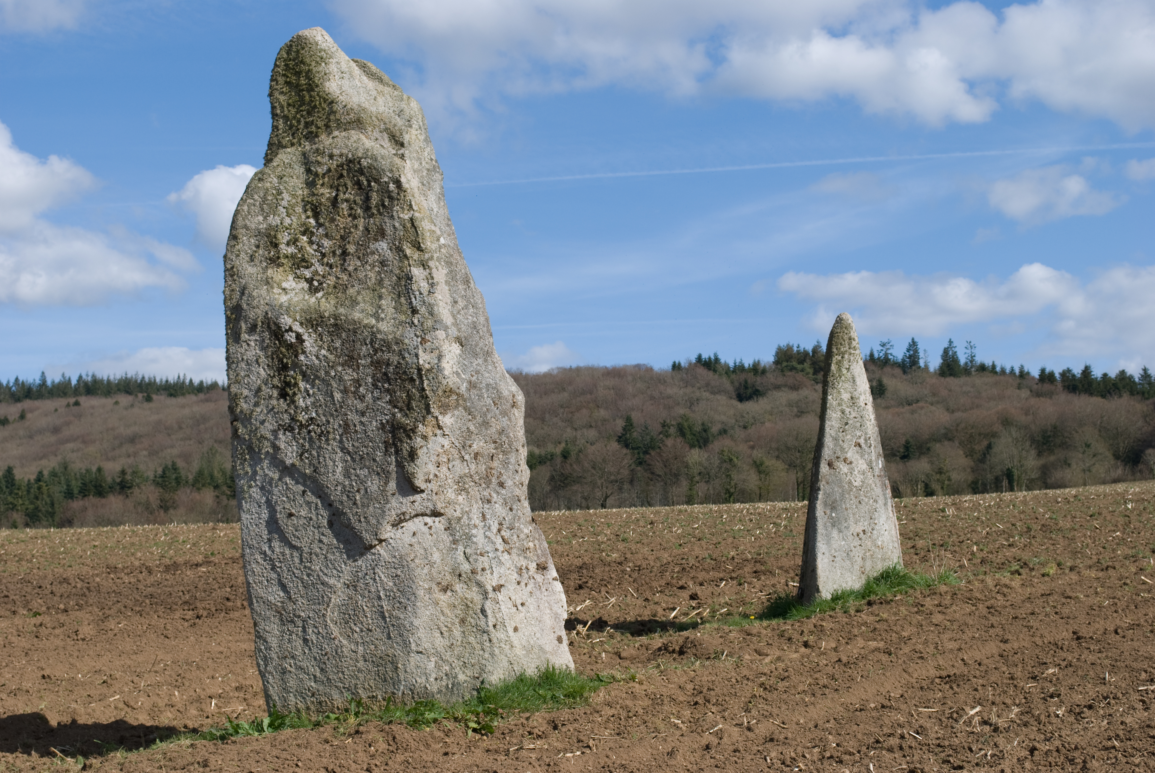 les menhirs jumeaux à Saint-Servais dans les Côtes d'Armor (France).